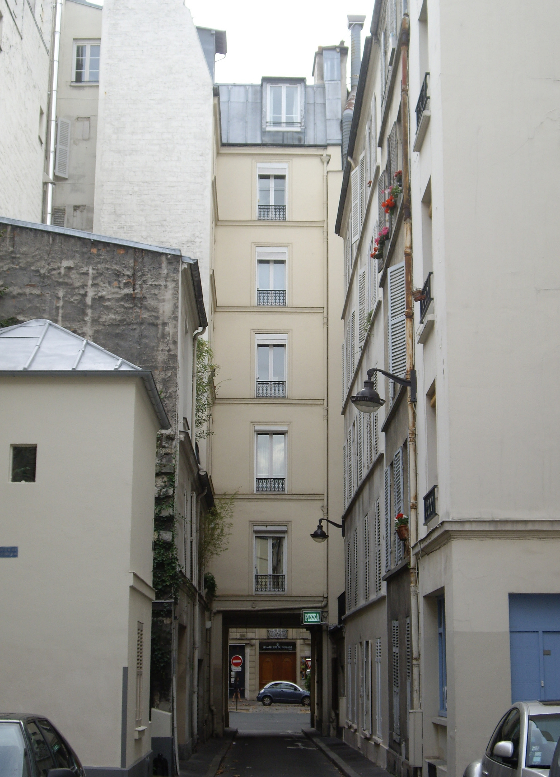 Passage de la Vierge, Paris 7e. Vu depuis la rue Cler, vers l'avenue Bosquet.